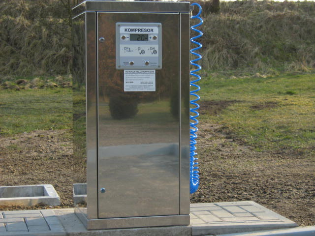 Nowoczesny elektroniczny kompresor na stacji paliwowej BLISKA w Golczewie.